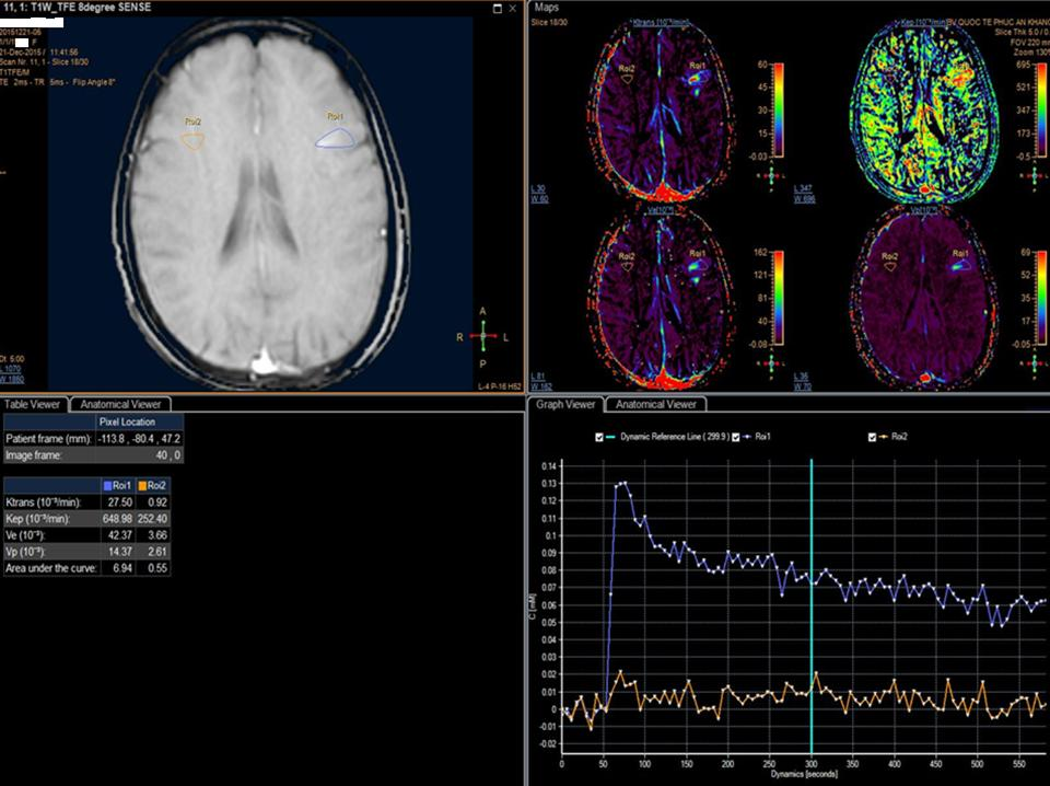 MRI tưới máu T1*W với Gadovist